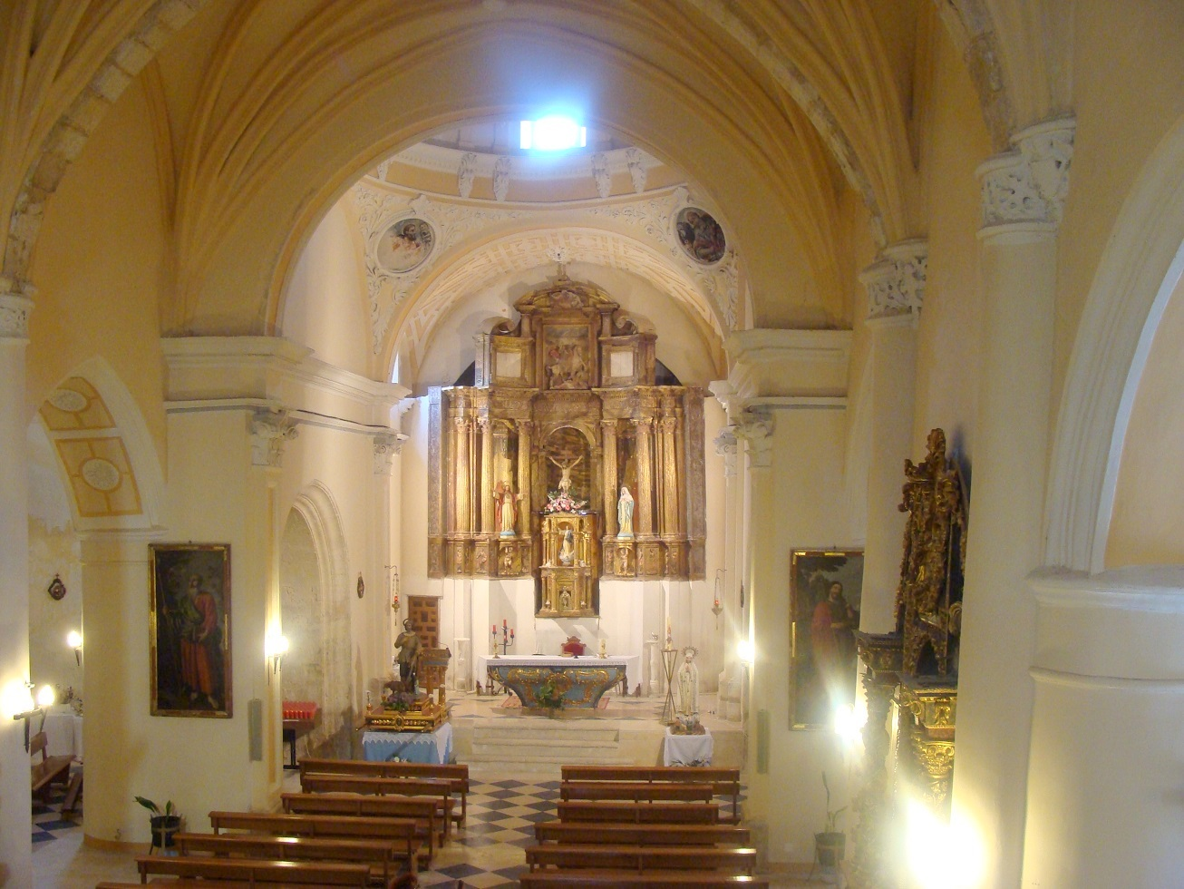 Nave Central de la Iglesia Parroquial de Nuestra Señora de la Purificación en Escamilla, Guadalajara. Imagen tomada desde el Coro.